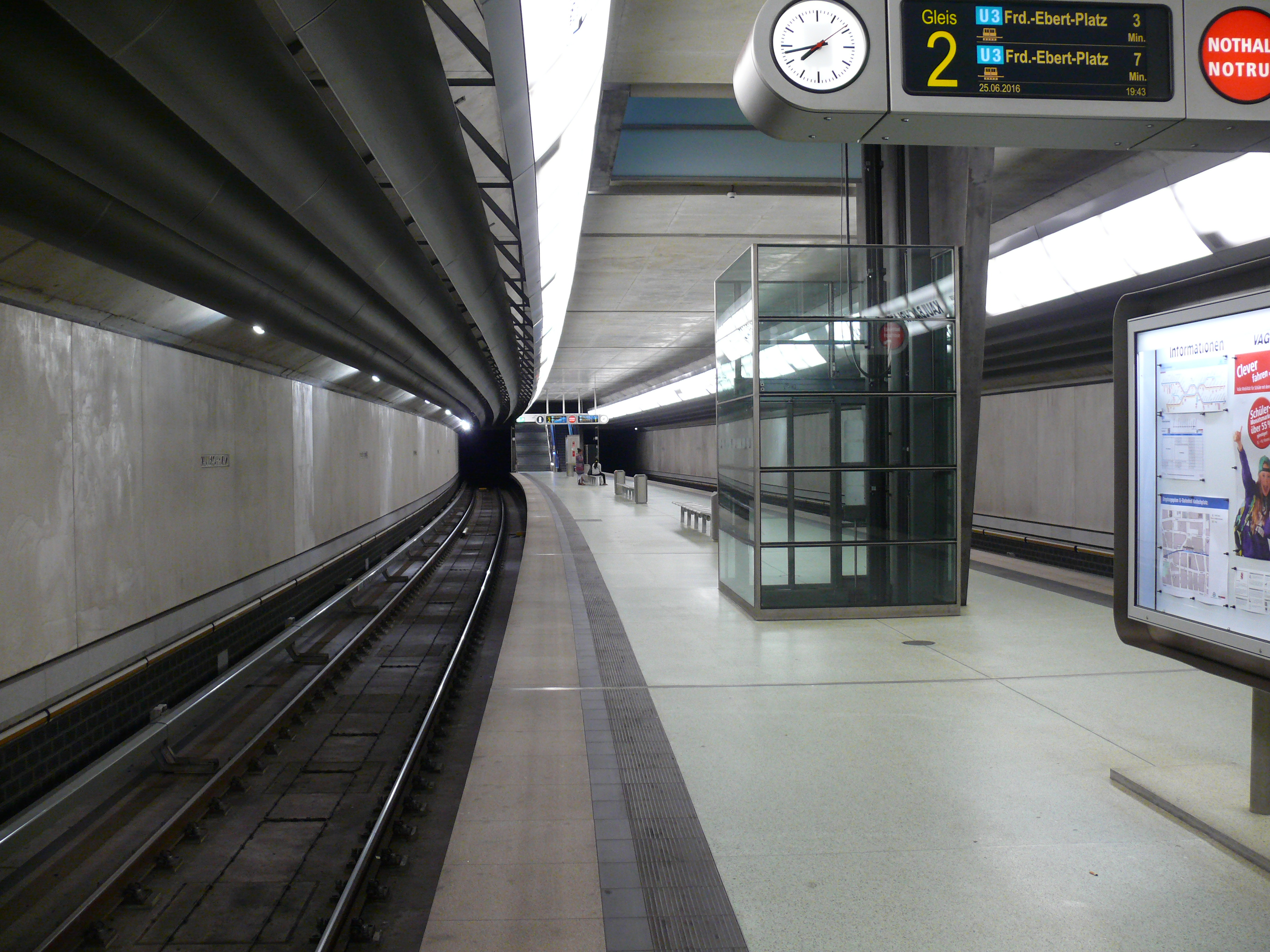 Bahnsteigebene am U-Bahnhof Kaulbachplatz in Nürnberg. Man beachte die Lamellen an den Decken über den Gleisen, wie sie den Schwung aufnehmen.